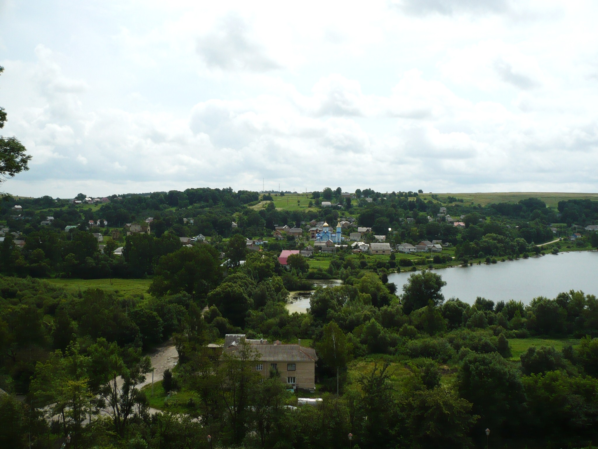 Wiśniowiec